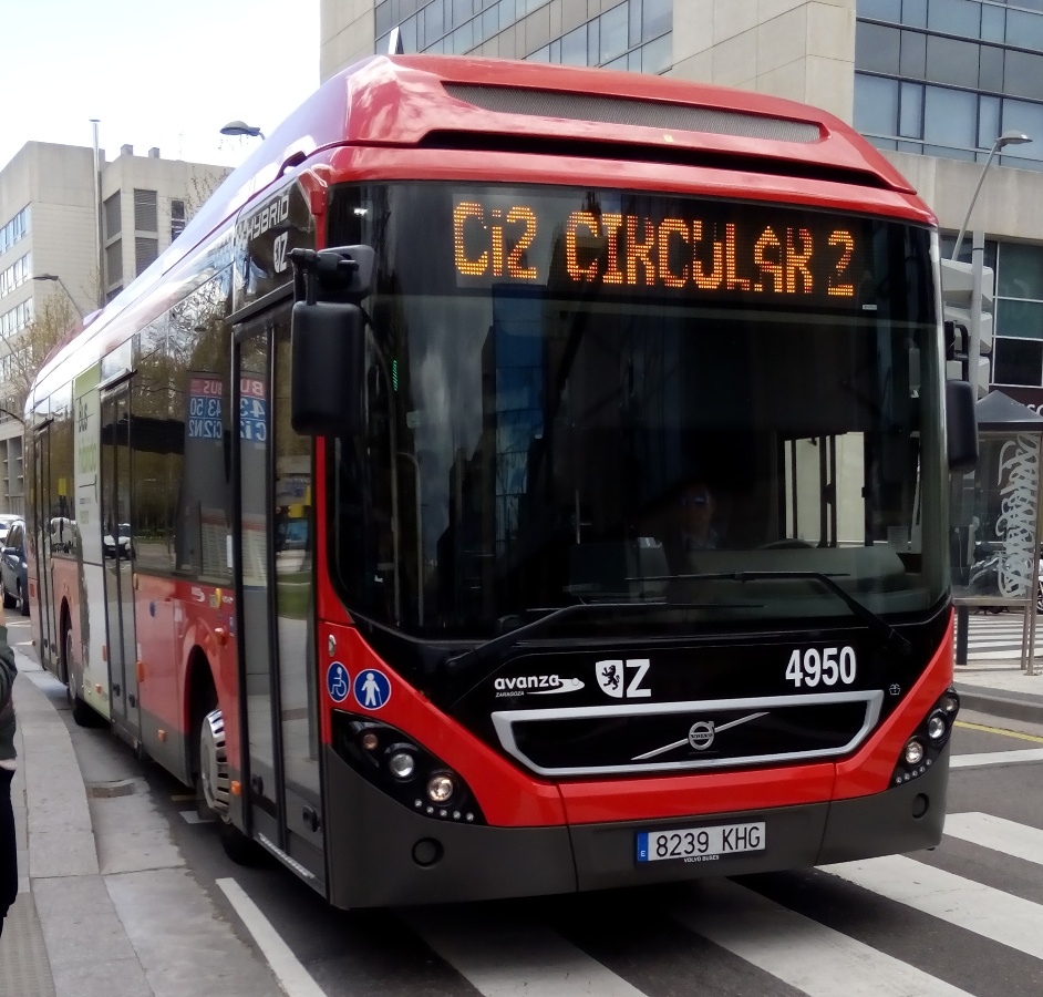 Avanza Zaragoza Híbrido